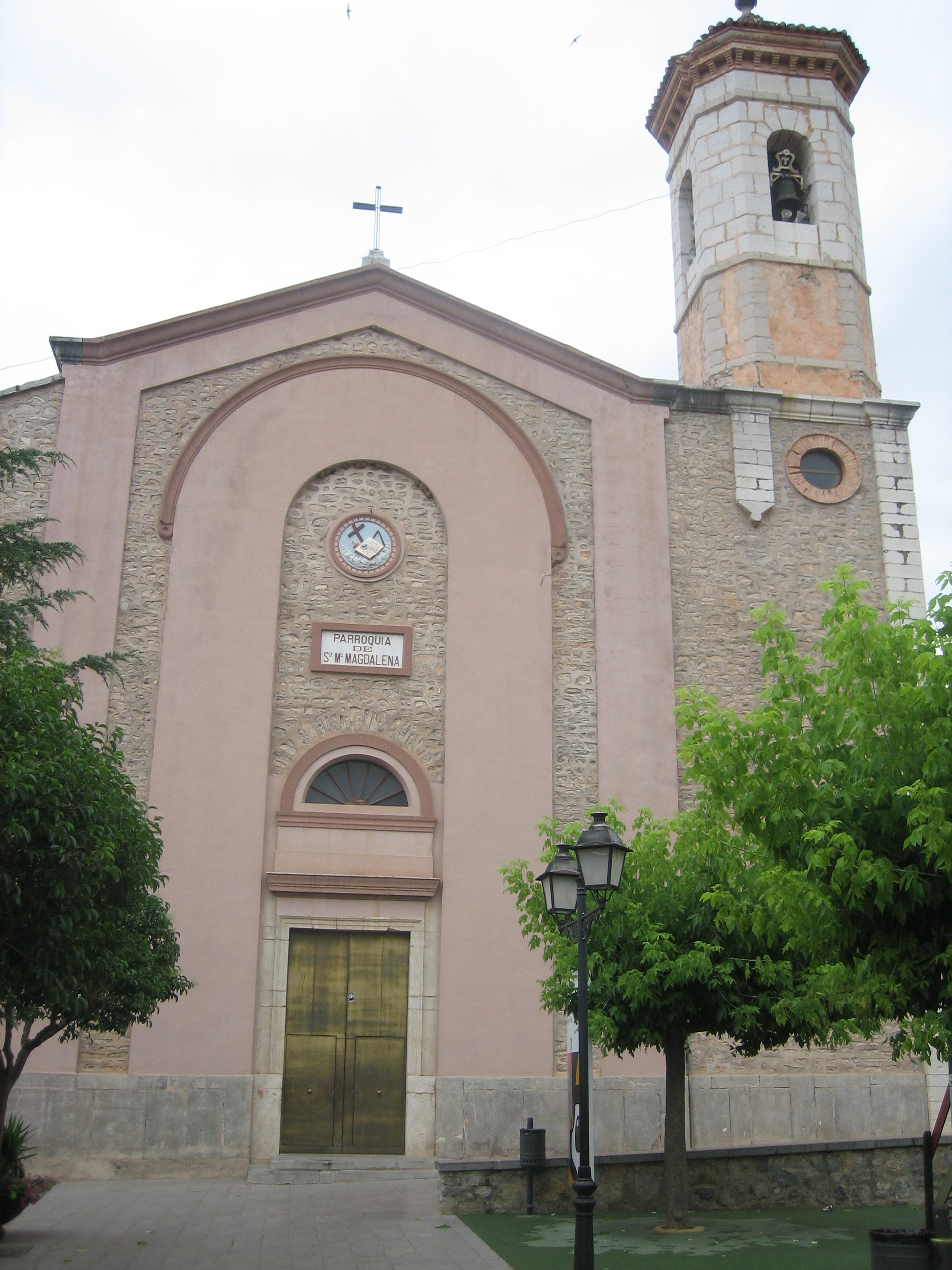 Església parroquial de Santa Magdalena de Polpís (Baix Maestrat)